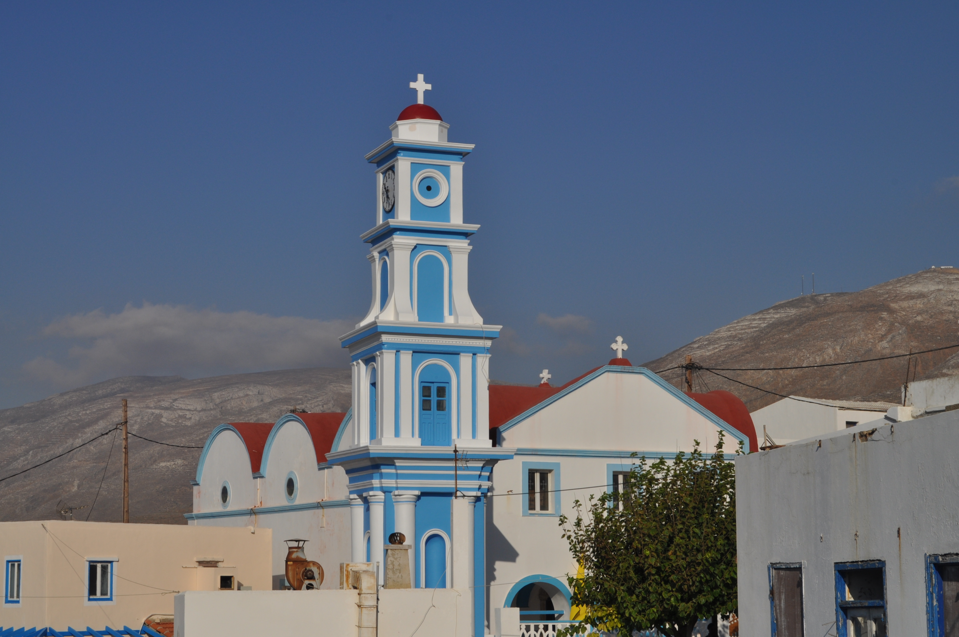 Δωδεκάνησα Κάσος This is a photography of Natura 2000 protected area with ID GR4210001